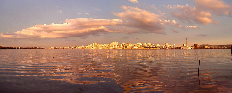 Panorâmica de Porto Alegre, Brasil, visto da Ilha da Pintada.